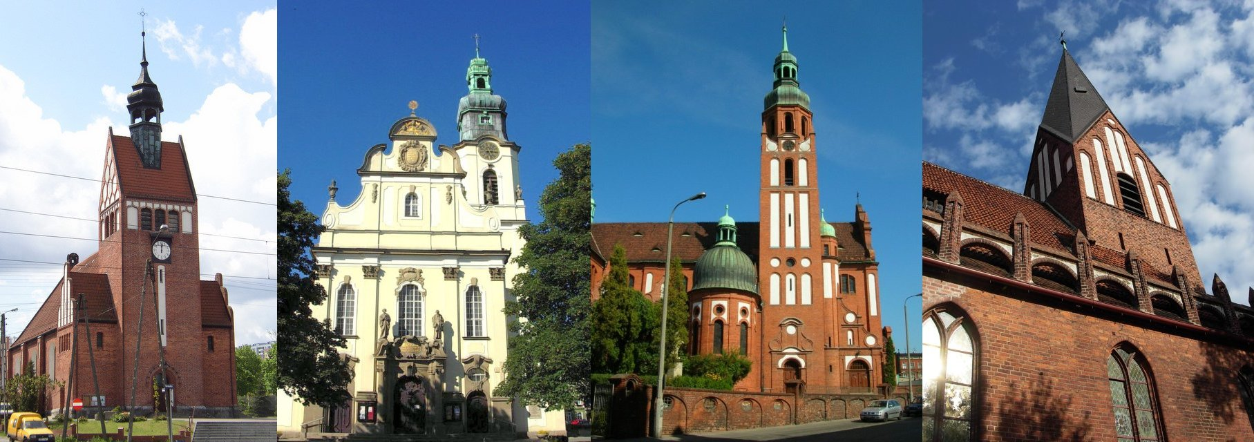 Bydgoskie kościoły: św. Józefa, Najświętszego Serca Jezusa, Chrystusa Zbawiciela, św. Andrzeja Boboli